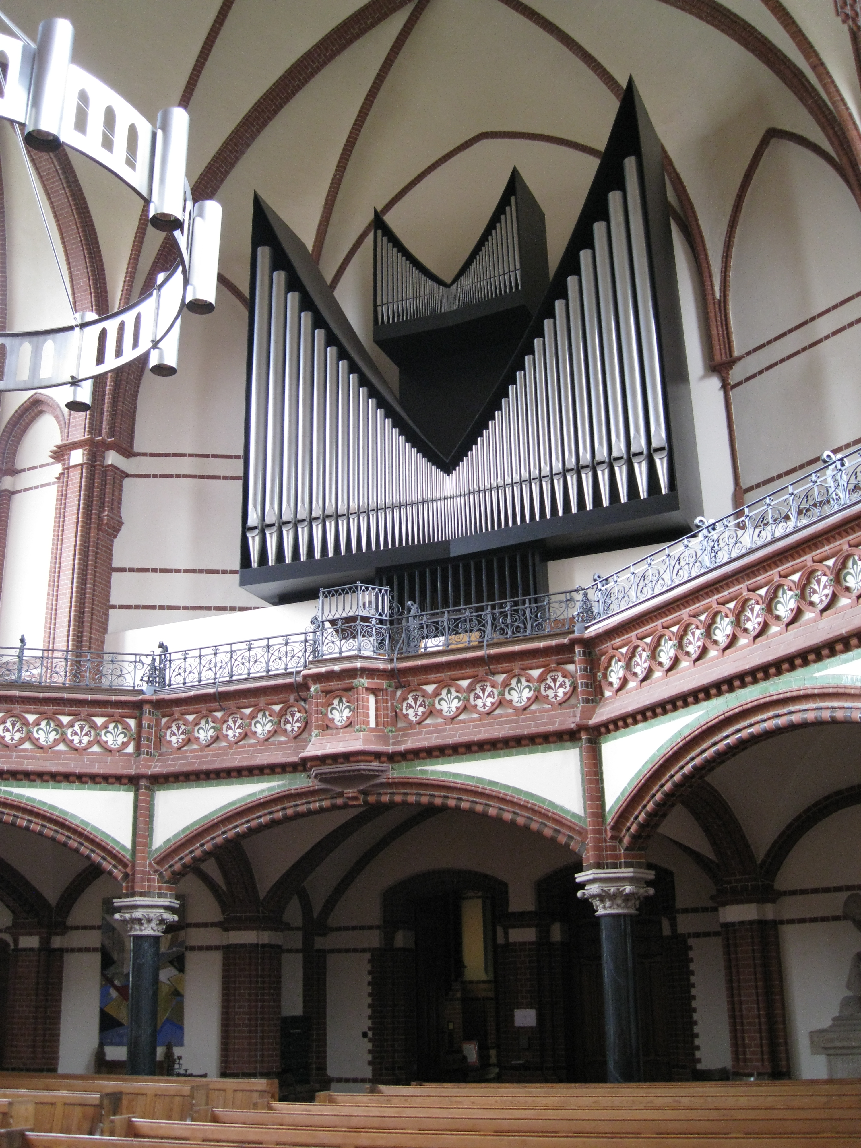 Orgel der Kirche Zum Guten Hirten Berlin-Friedenau